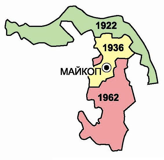 Рост территории Адыгеи в 1922-62 гг.